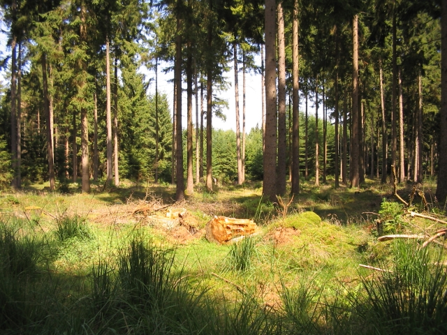 Fichtenmonokultur